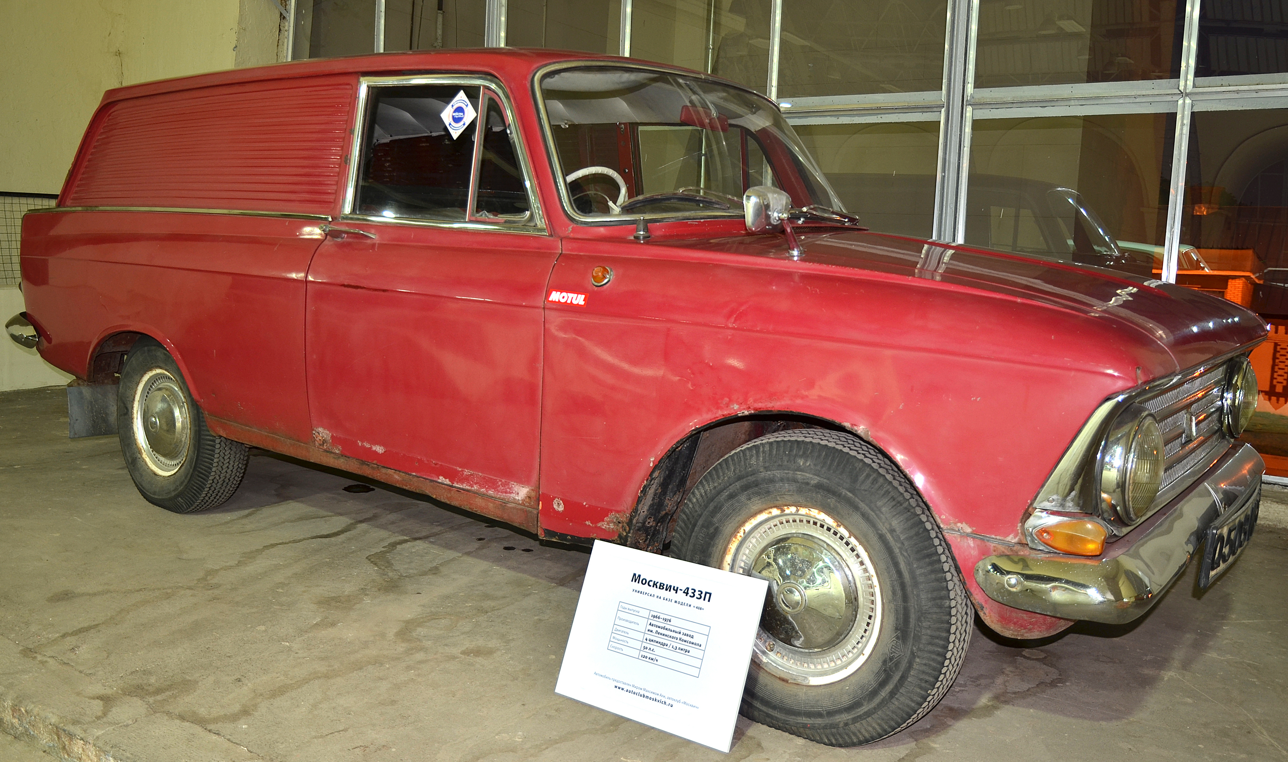 Можно увидеть здесь : You can see here